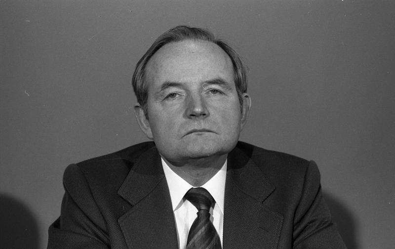 Pressekonferenz der Innenminster der Länder mit Bundesminister Gerhard Rudolf Baum im Bundesrat